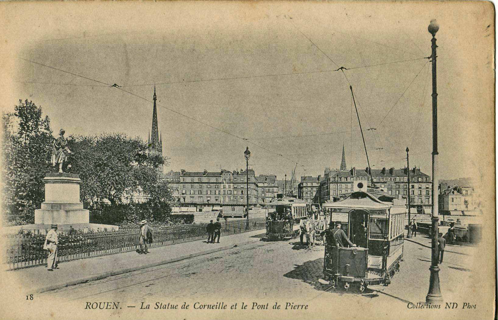 Carte postale ancienne éditée par ND, n°18 : ROUEN - La Statue de Corneille et le Pont de Pierre